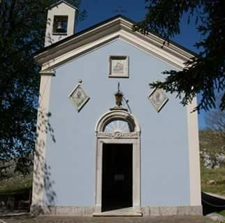 Acquafondata